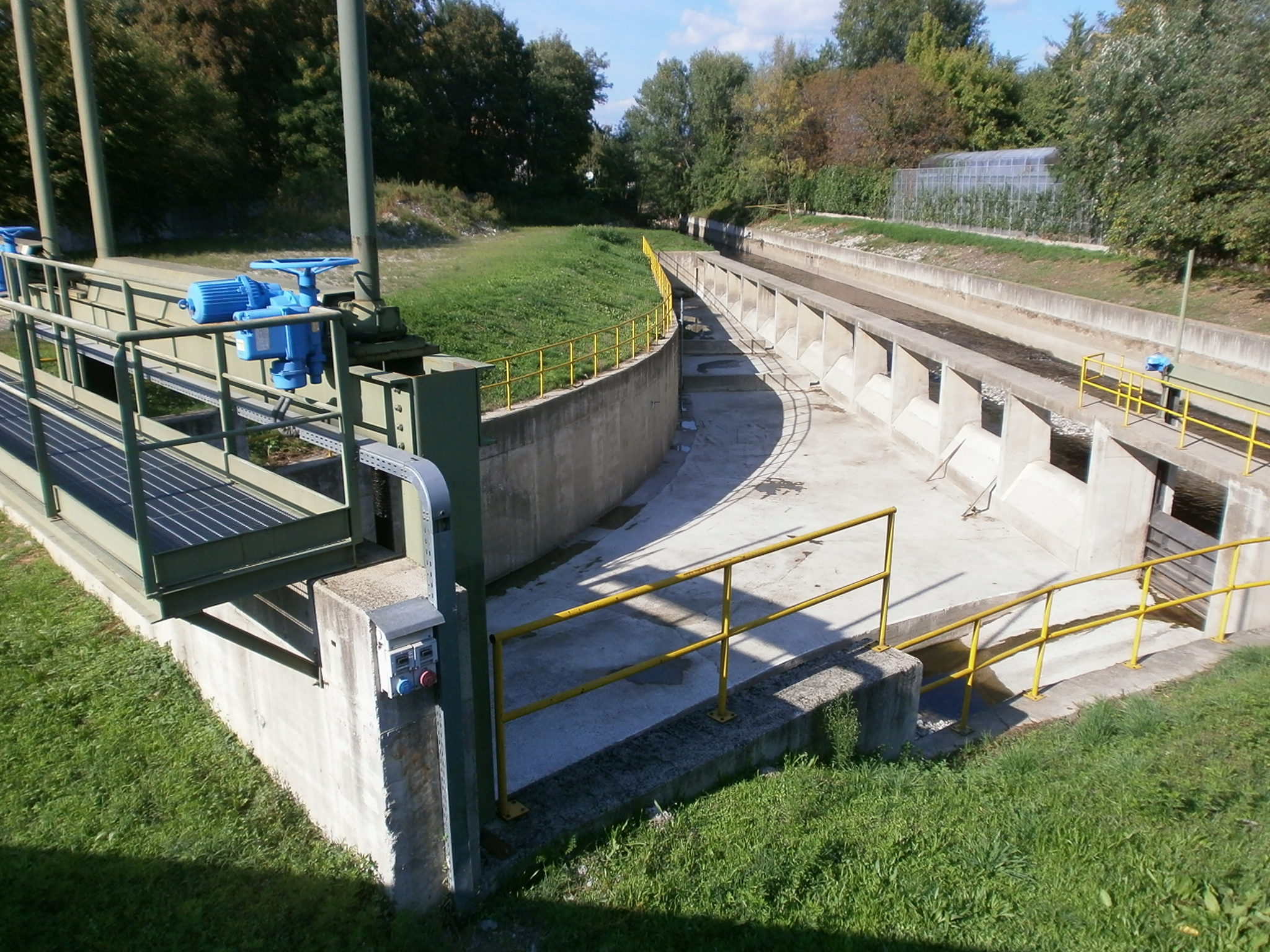 Scolmatore del seveso - palazzolo milanese - 03